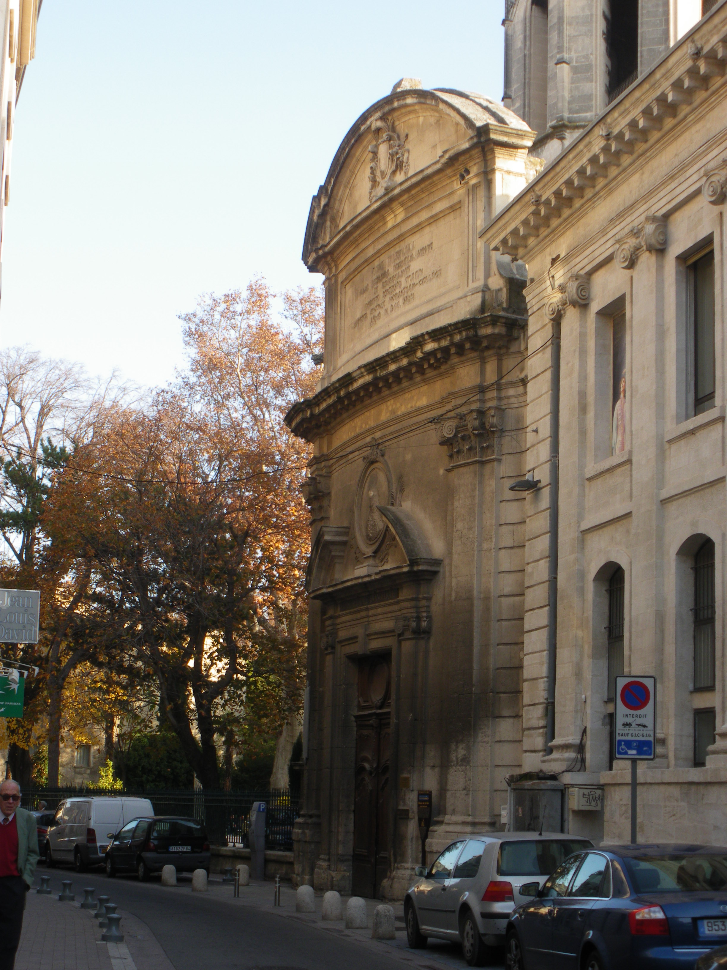 Temple Saint Martial, Avignon, France